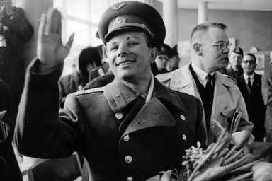 Gagarin togs emot med blommor och bodde på Hotell Arkaden under sitt Malmöbesök